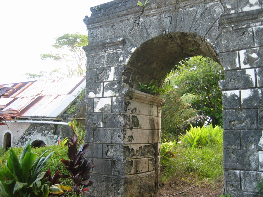 Photo Couvent de Rouru (Photo personnel 2006) Utilisateur:FRED